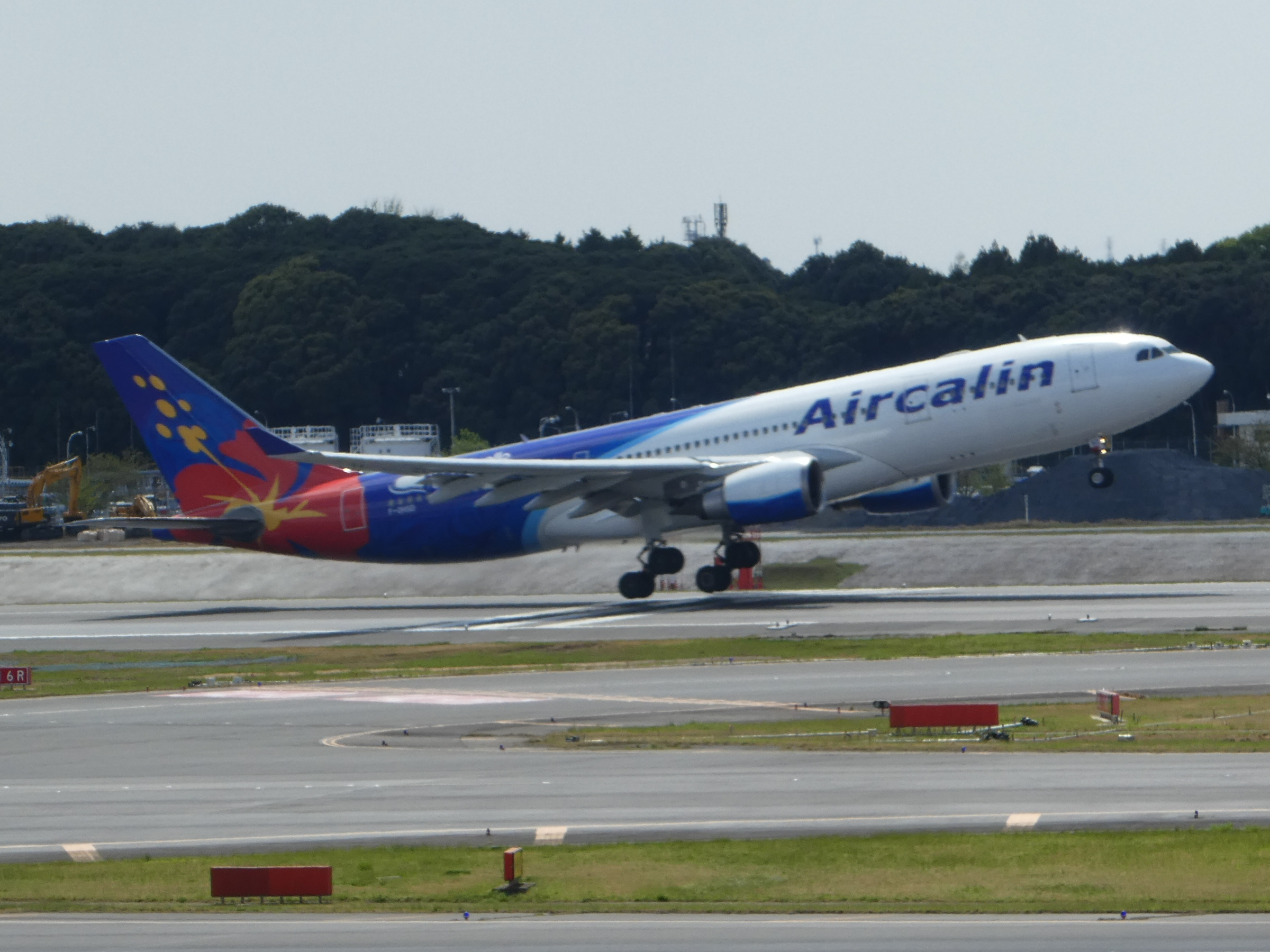 エアカランA330-200が離陸する様子です。